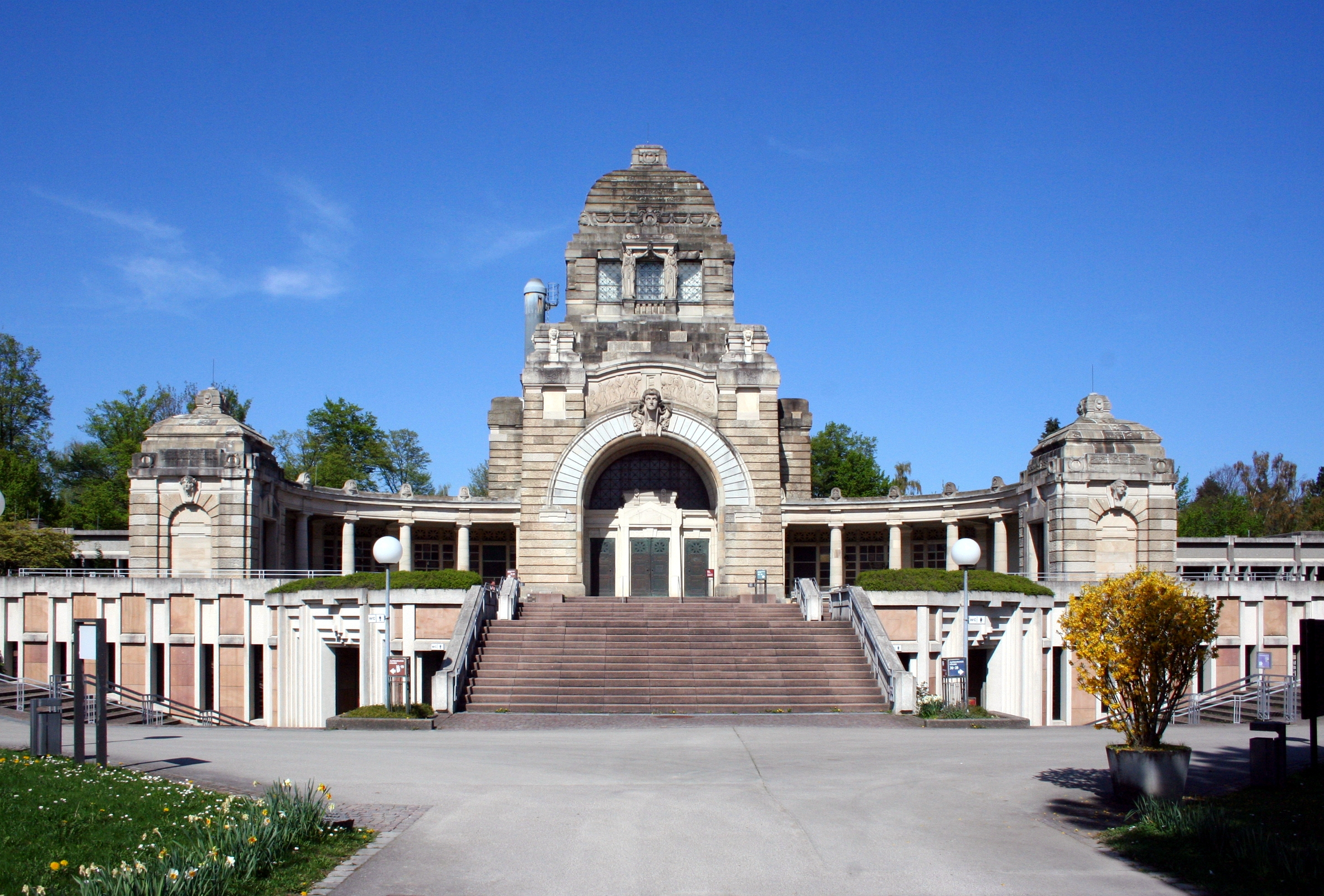 Kreamatorium auf dem Pragfriedhof in Stuttgart-Nord